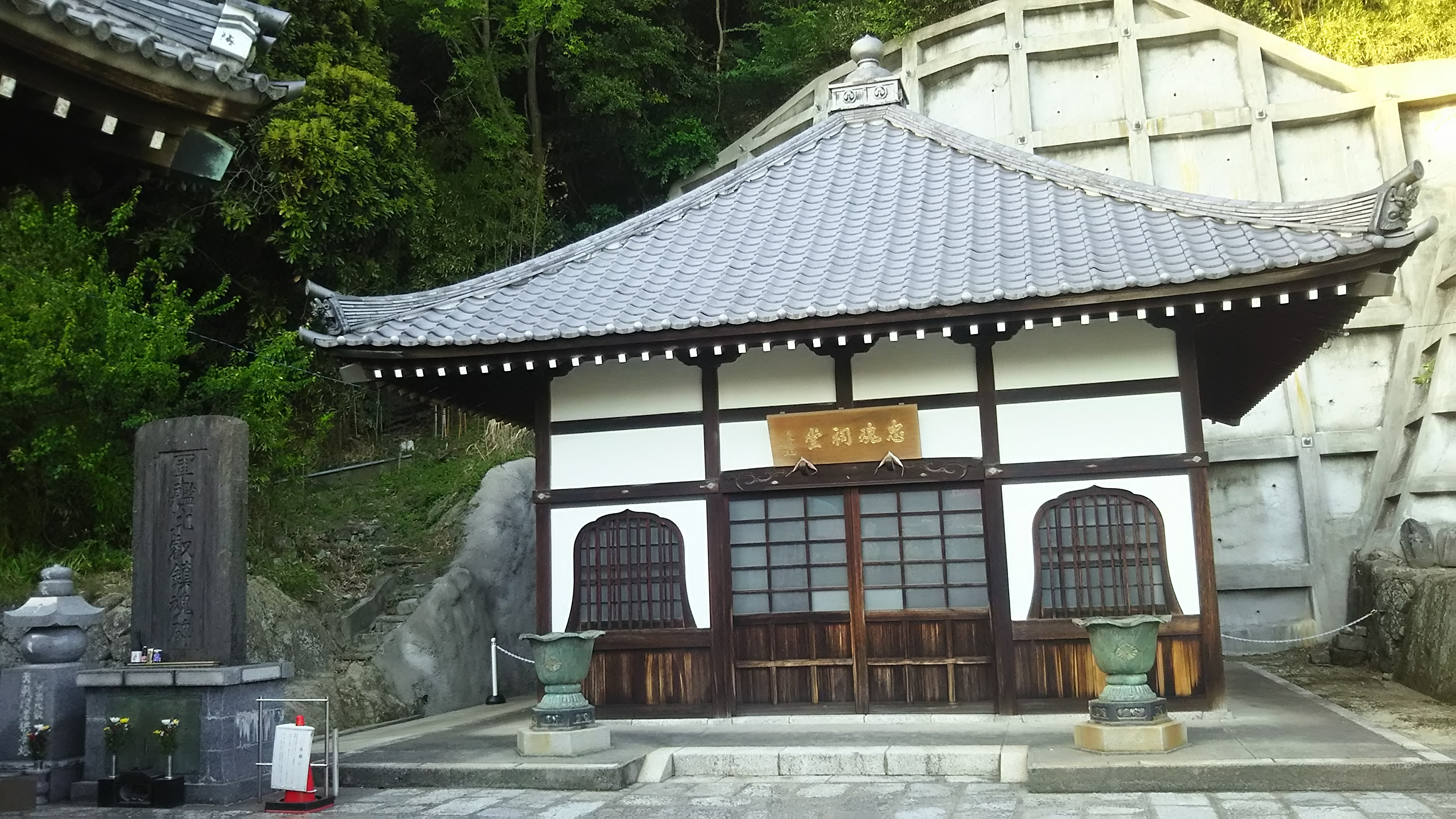 衣笠駅光心寺